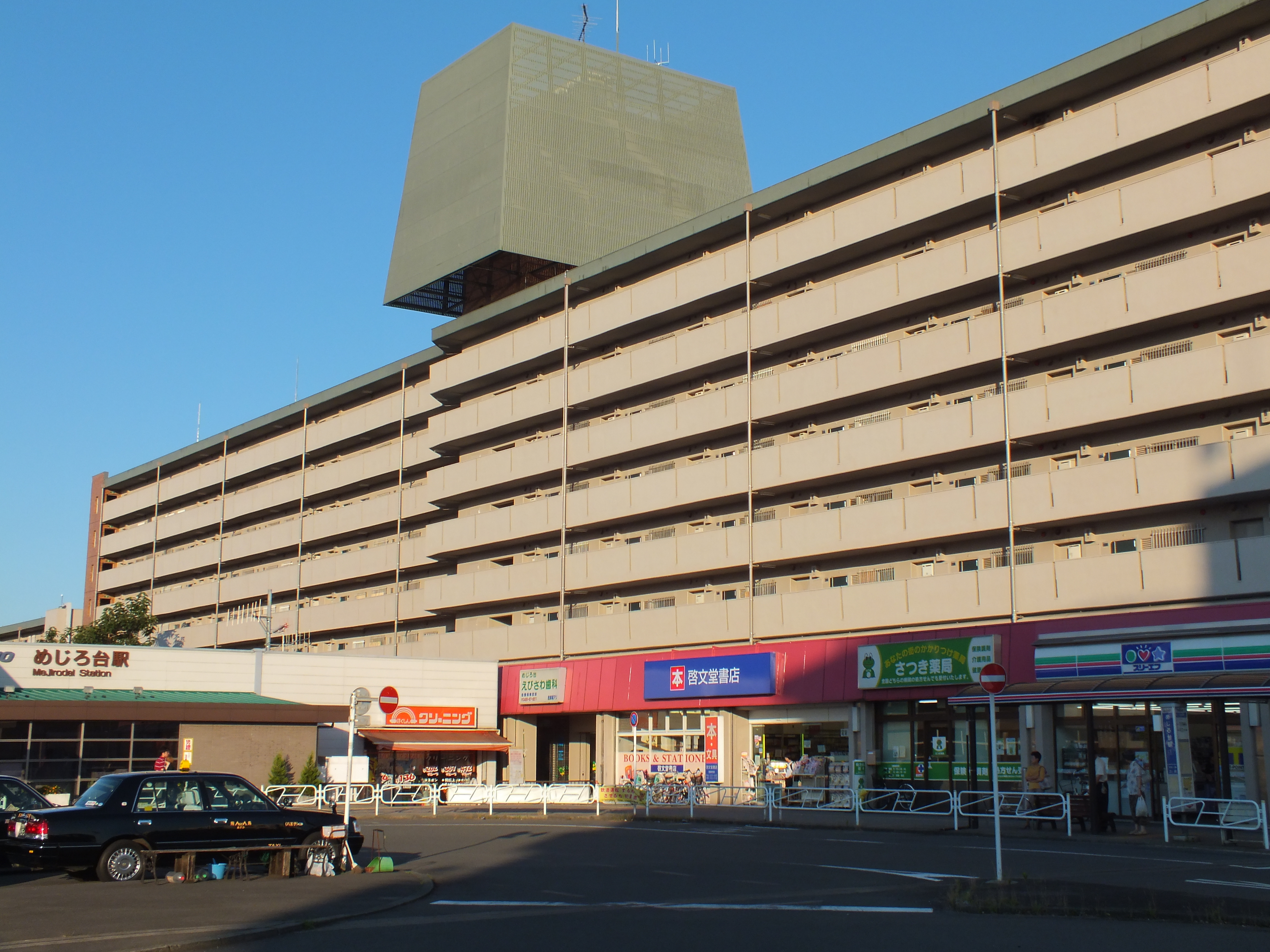 2011年7月11日に撮影しためじろ台駅前。